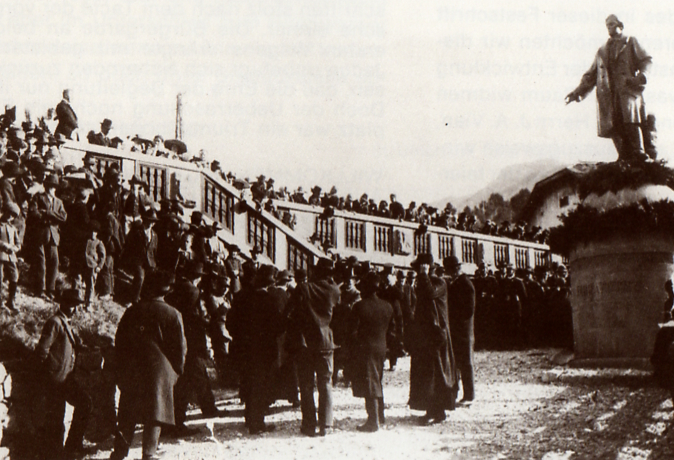 Monument des Johann Baptist Purger - Werk des Bildhauers Ludwig Moroder